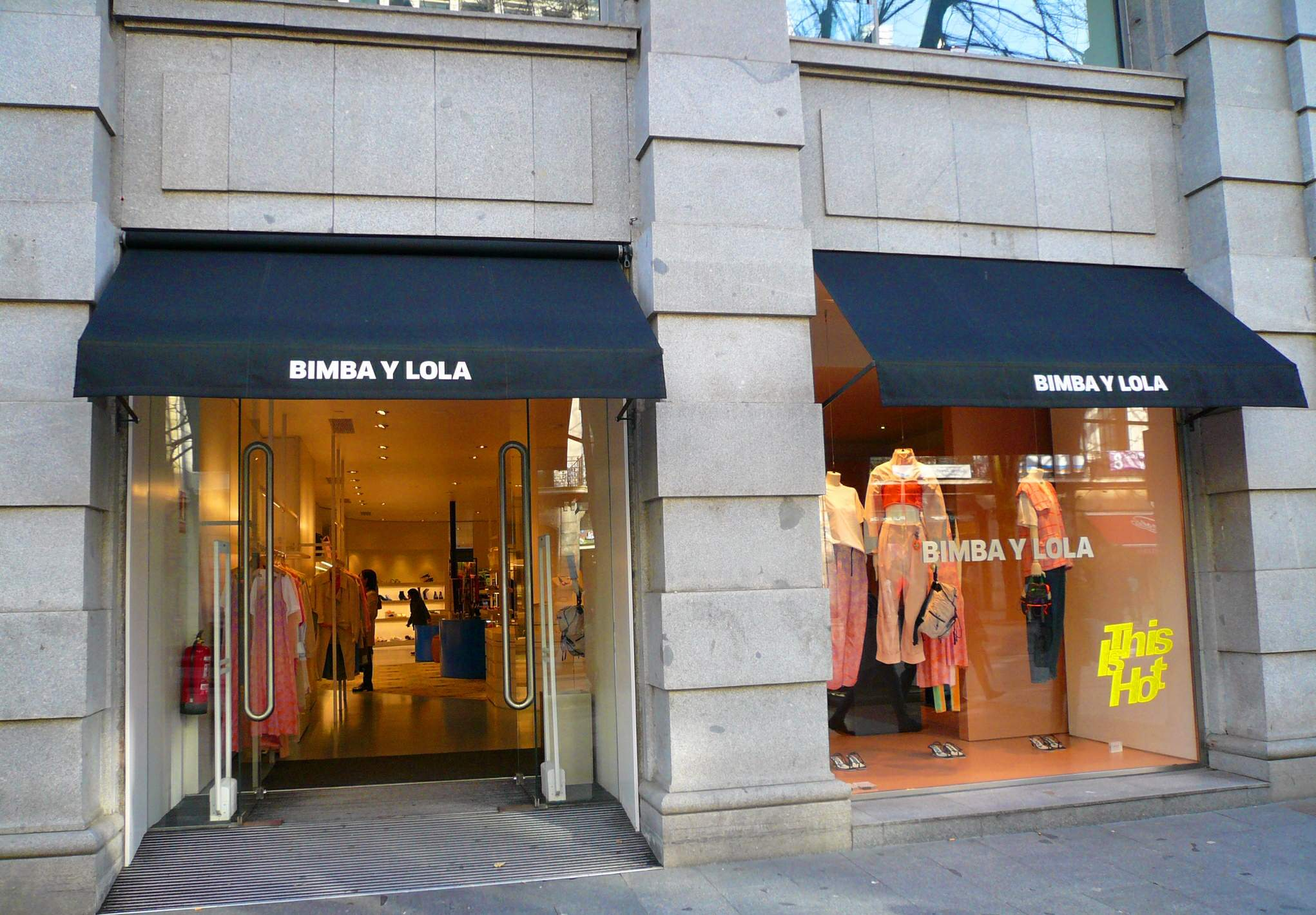 Bilbao - Tienda de Bimba y Lola en Gran Via